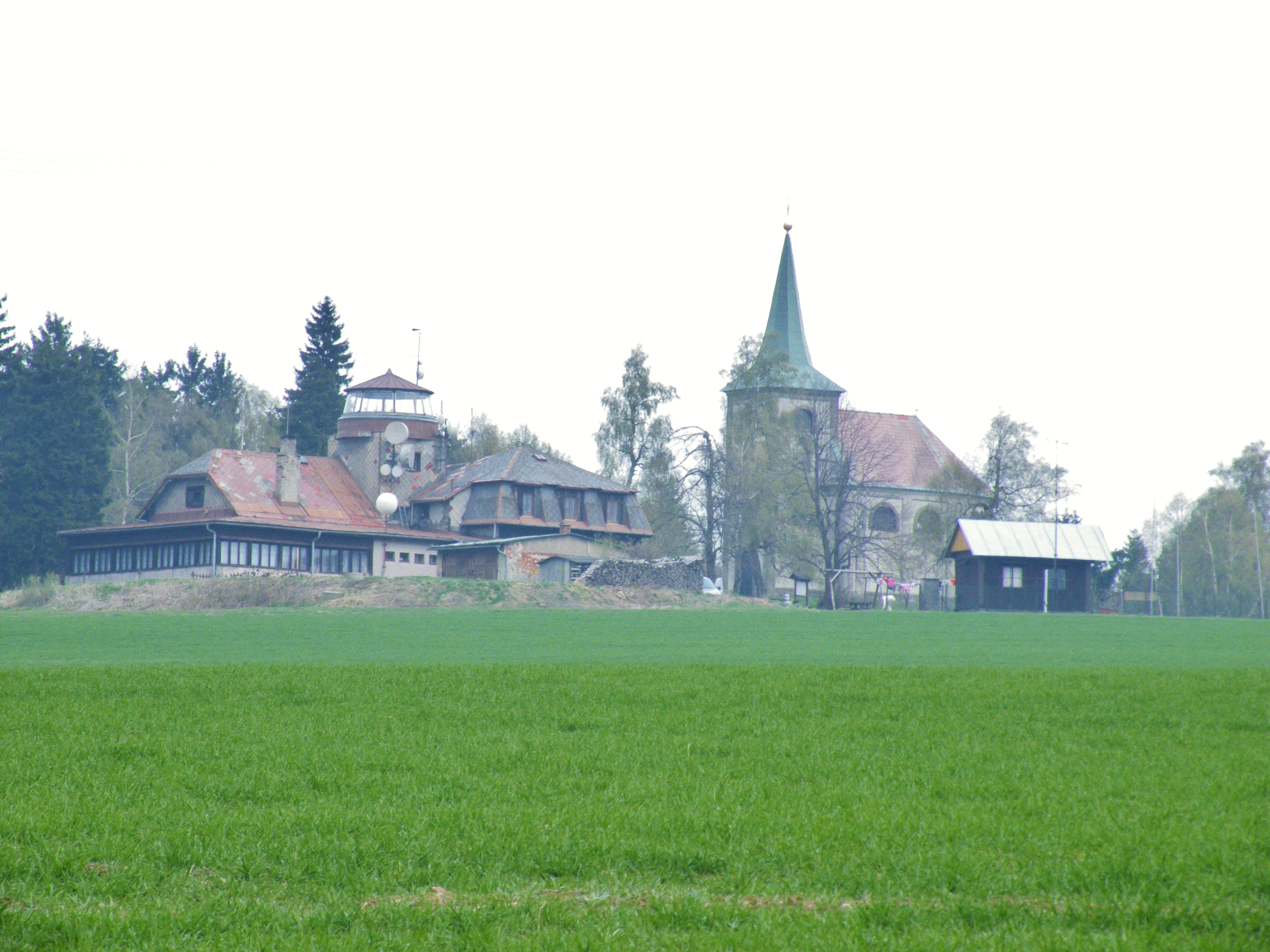 Zvičina její rekreační část, restaurace s rozhӀednou a kapӀe.